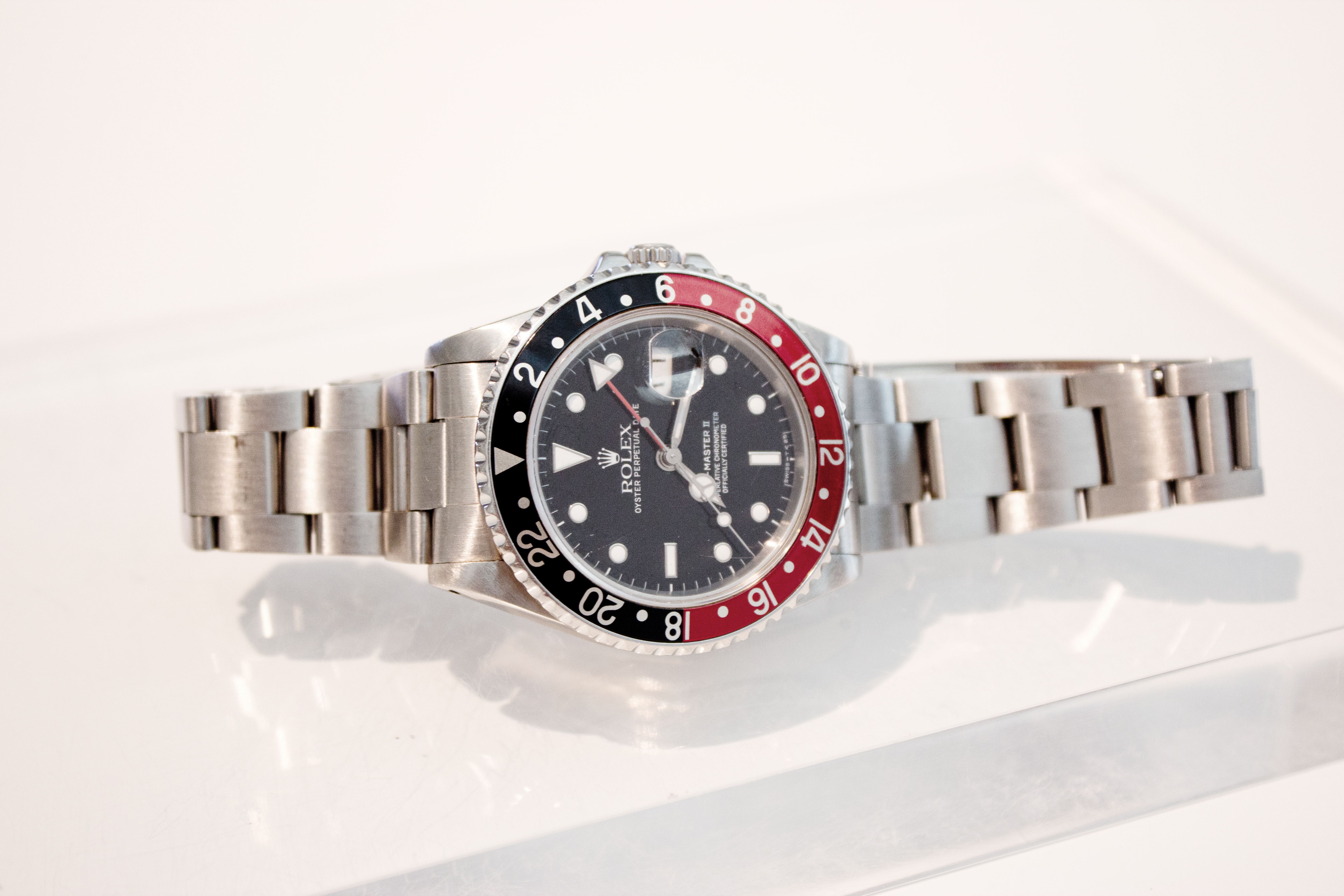 Rolex GMT Master II . Reloj pulsera de Carlos Menem Jr, hijo del ex presidente argentino Carlos Menem.